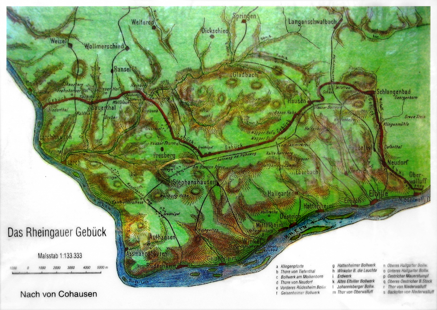 Karte vom Verlauf des Rheingauer Gebücks am Waldparkplatz Förster-Bitter-Eiche bei Hausen vor der Höhe